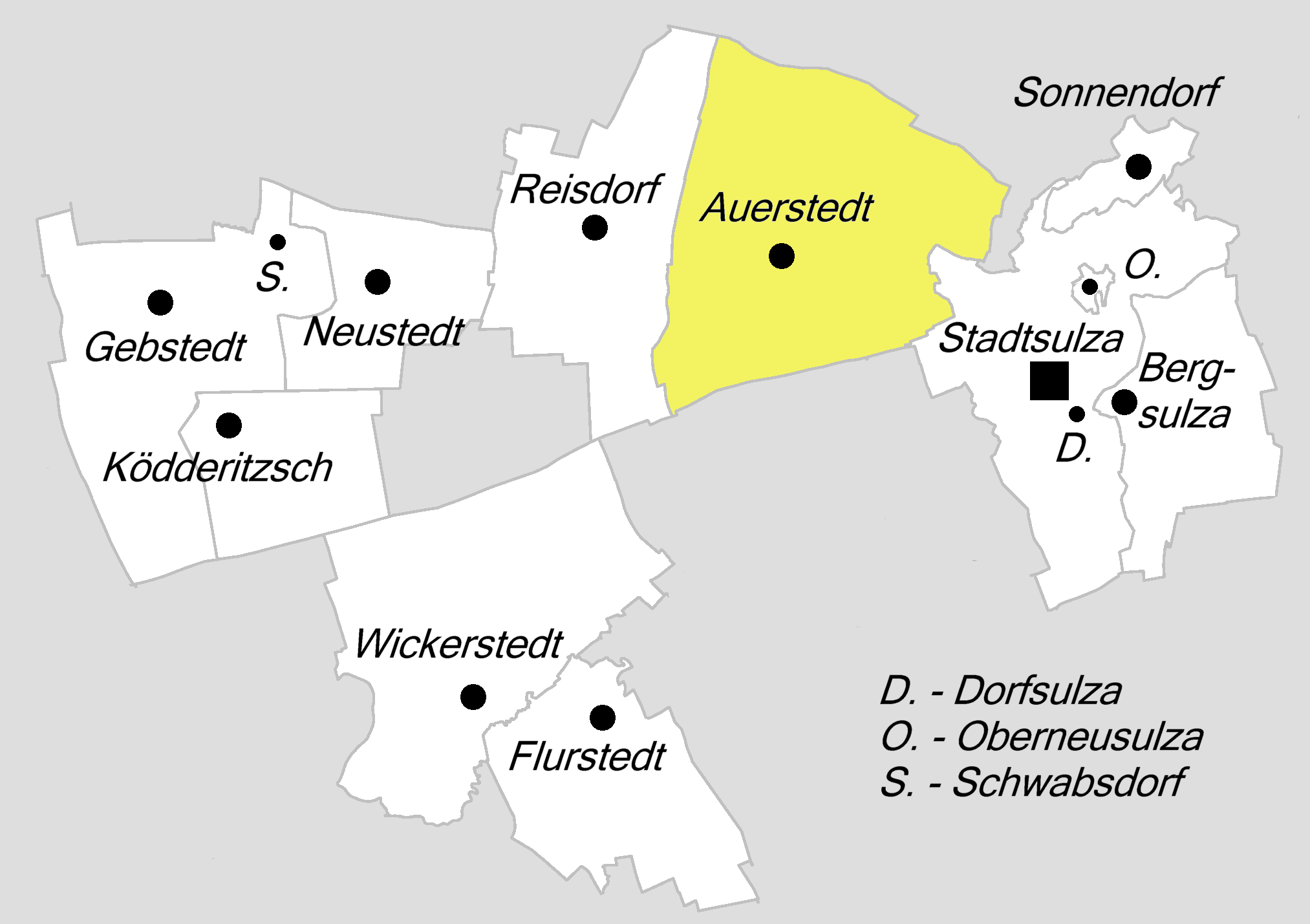 Bad Sulza, OT Auerstedt